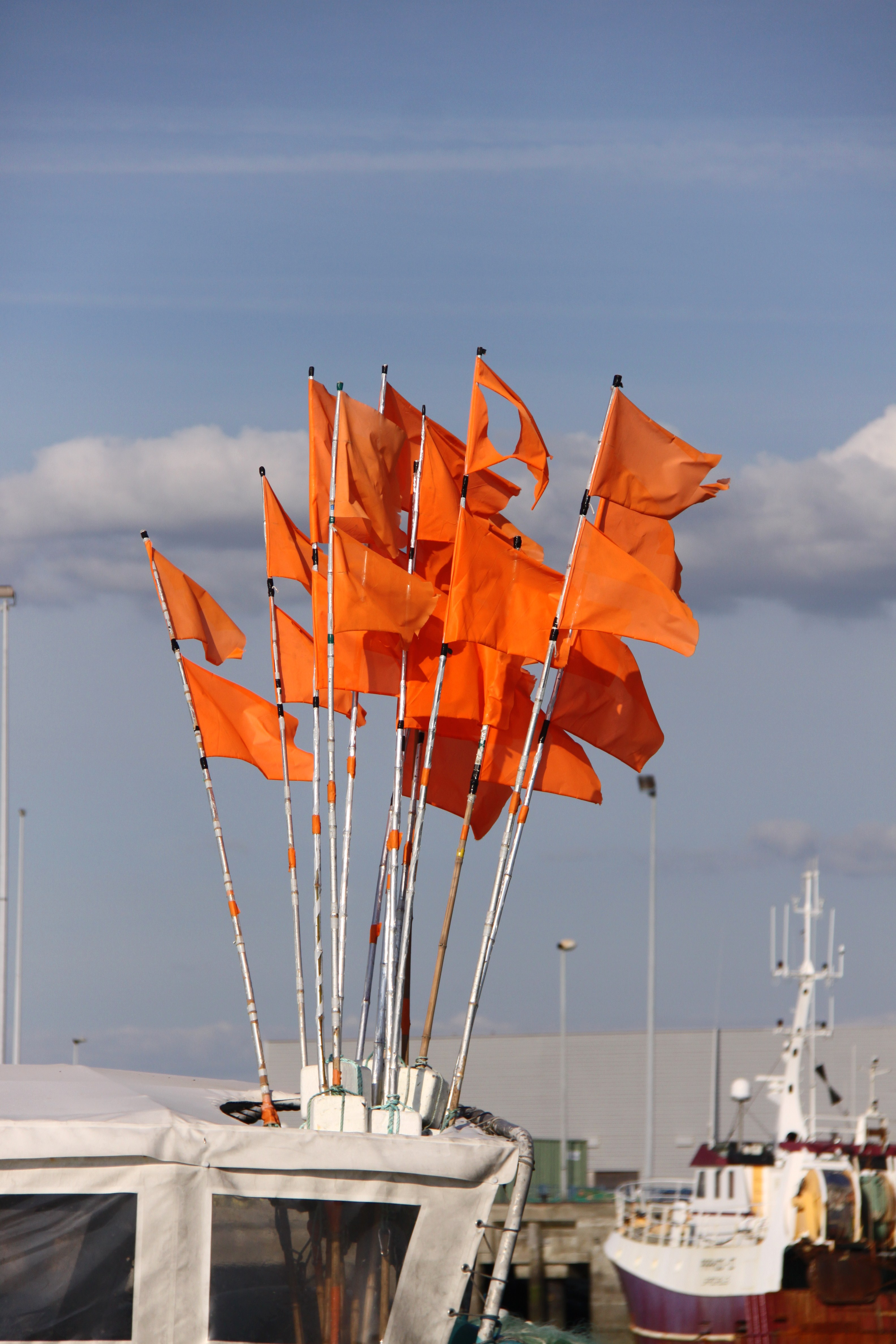 Le fileyeur "Jeannot" dans le Bassin des Coureauleurs du port de pêche de Chef de Baie. Balises de matériel de pêche. Ce bateau de pêche (fileyeur et palangrier) a été construit en 1989. C' est un catamaran de 11,60 mètres de long. La puissance de ses moteurs est de 134 kw au total. Sa coque est en métal. Immatriculation: LR 711794. La Rochelle, Charente Maritime, France.